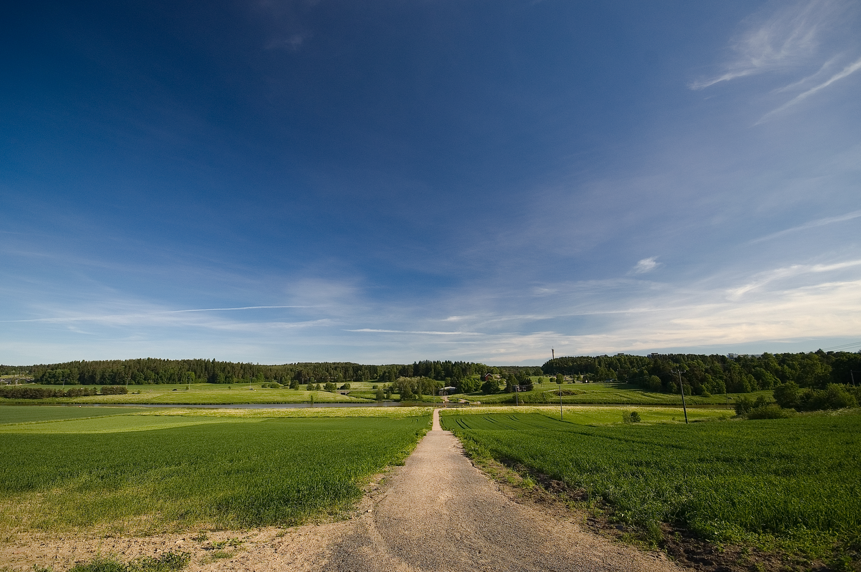 Aurajokea Kuralan ja Halisten kohdalla, jossa on/oli kampiföri, jolla pääsee/pääsi joen yli.